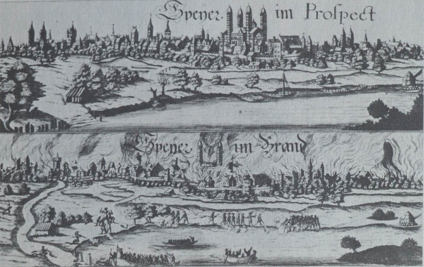 Speyer vor und während des Brandes am 31. Mai 1689